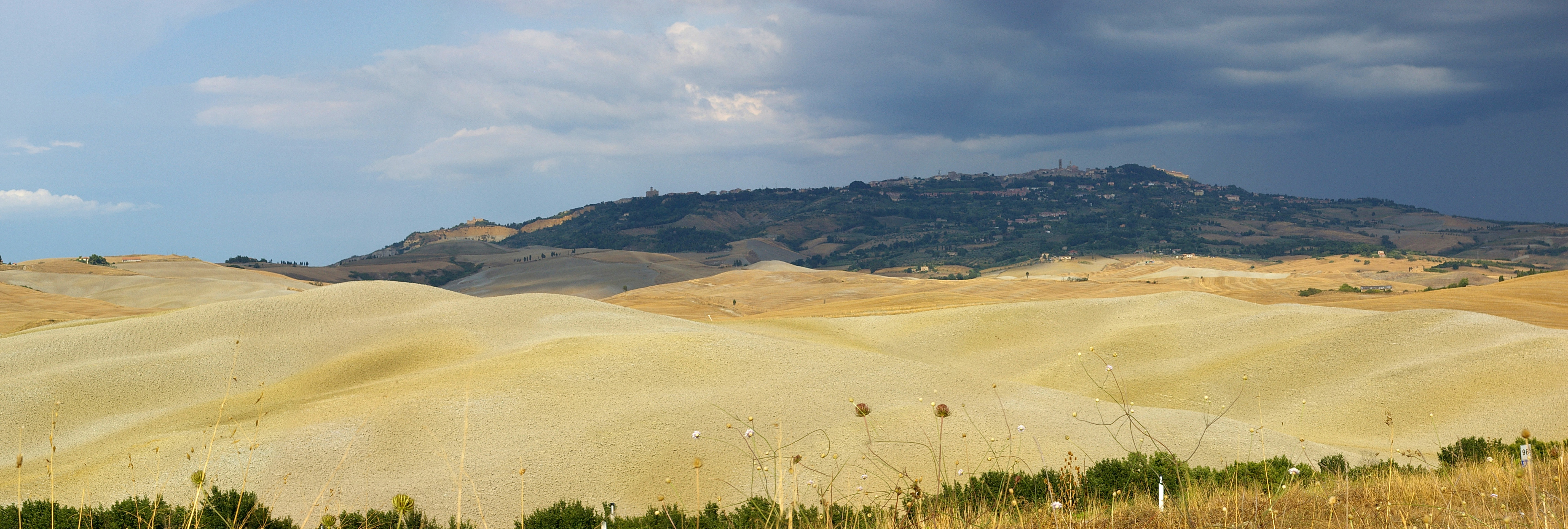 Volterra, Toscan, Italia